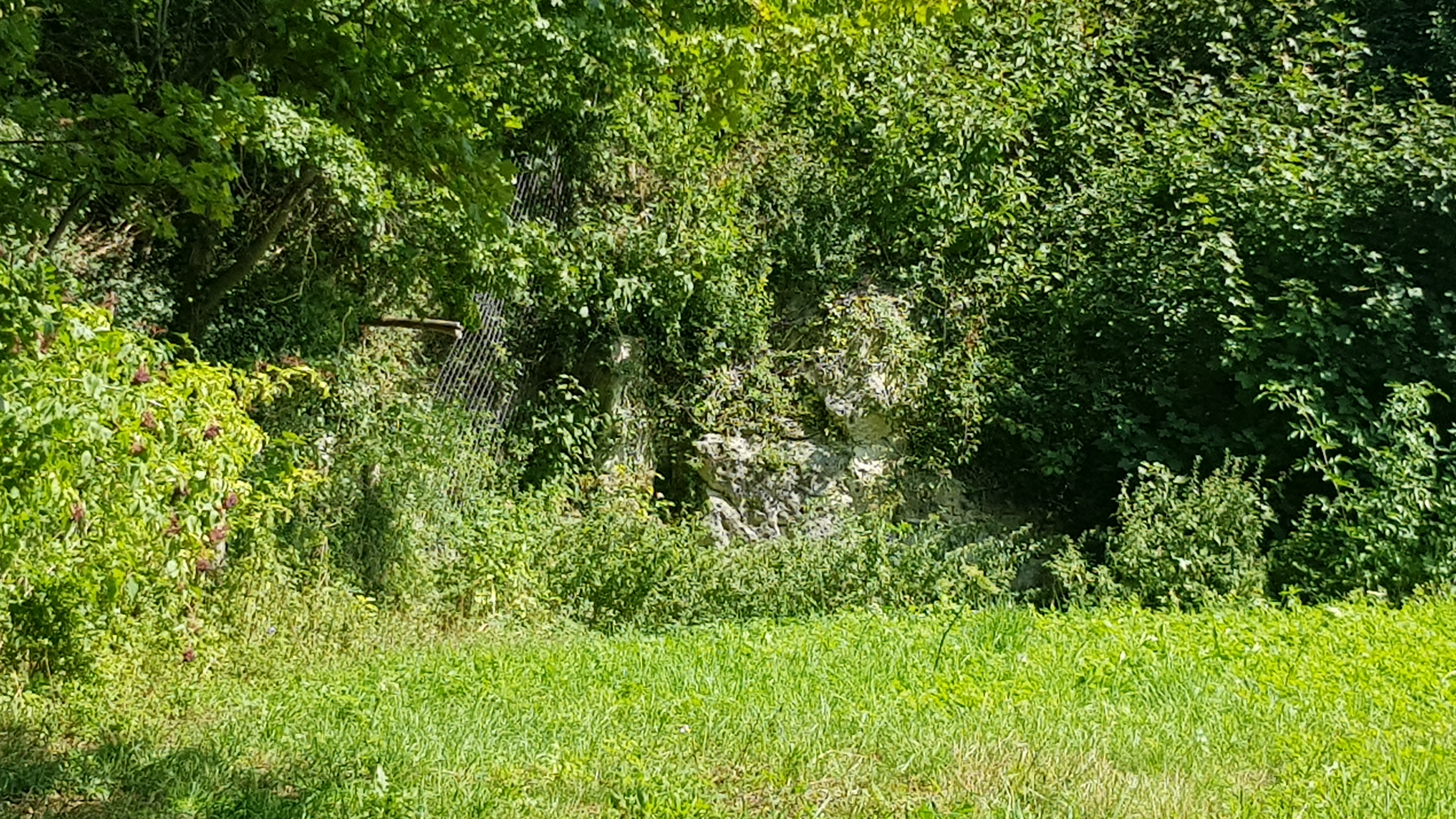 Groeve aan de Heide, Valkenburg, Nederland